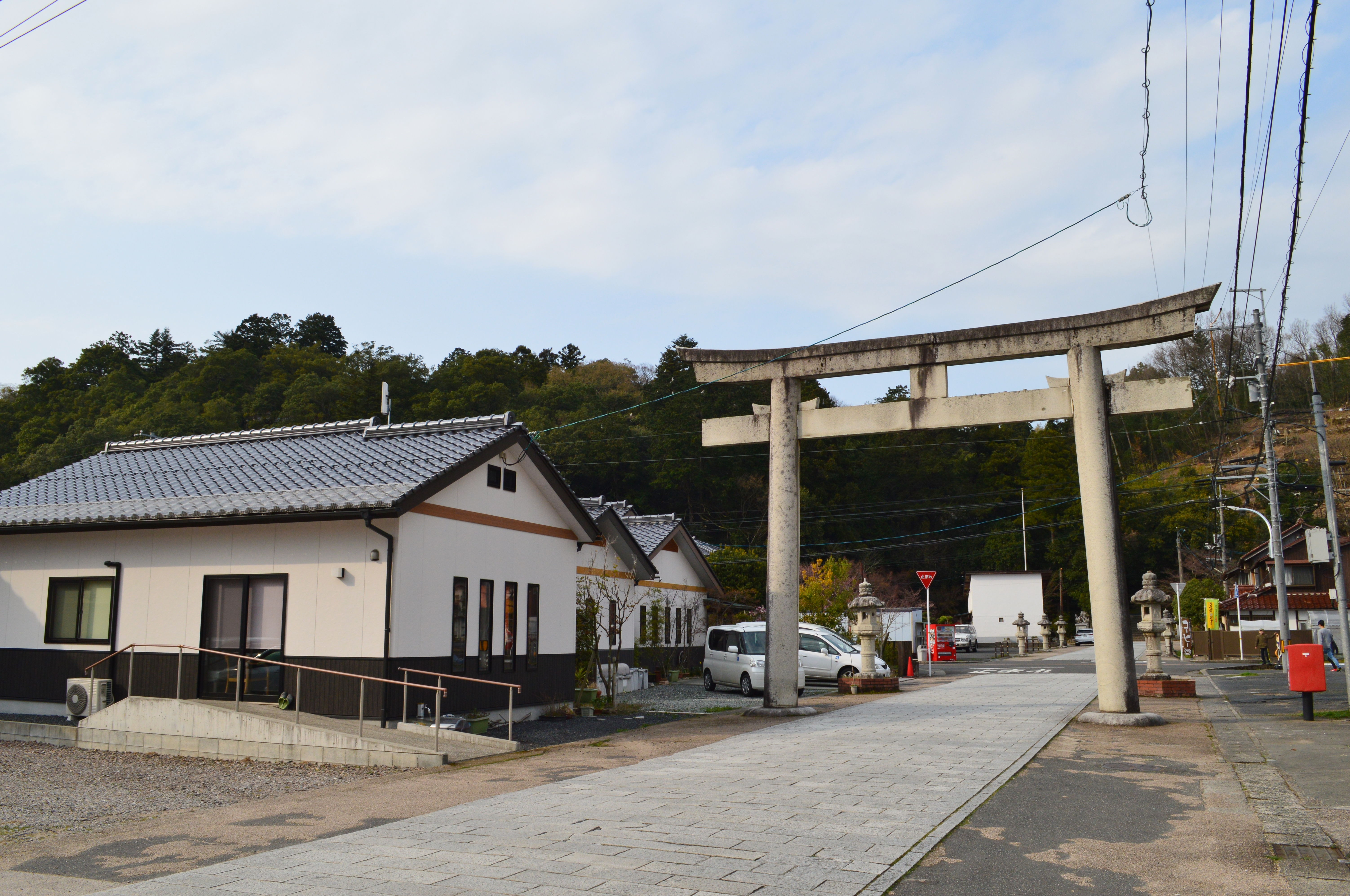 宇倍神社 大鳥居 Nikon D3200